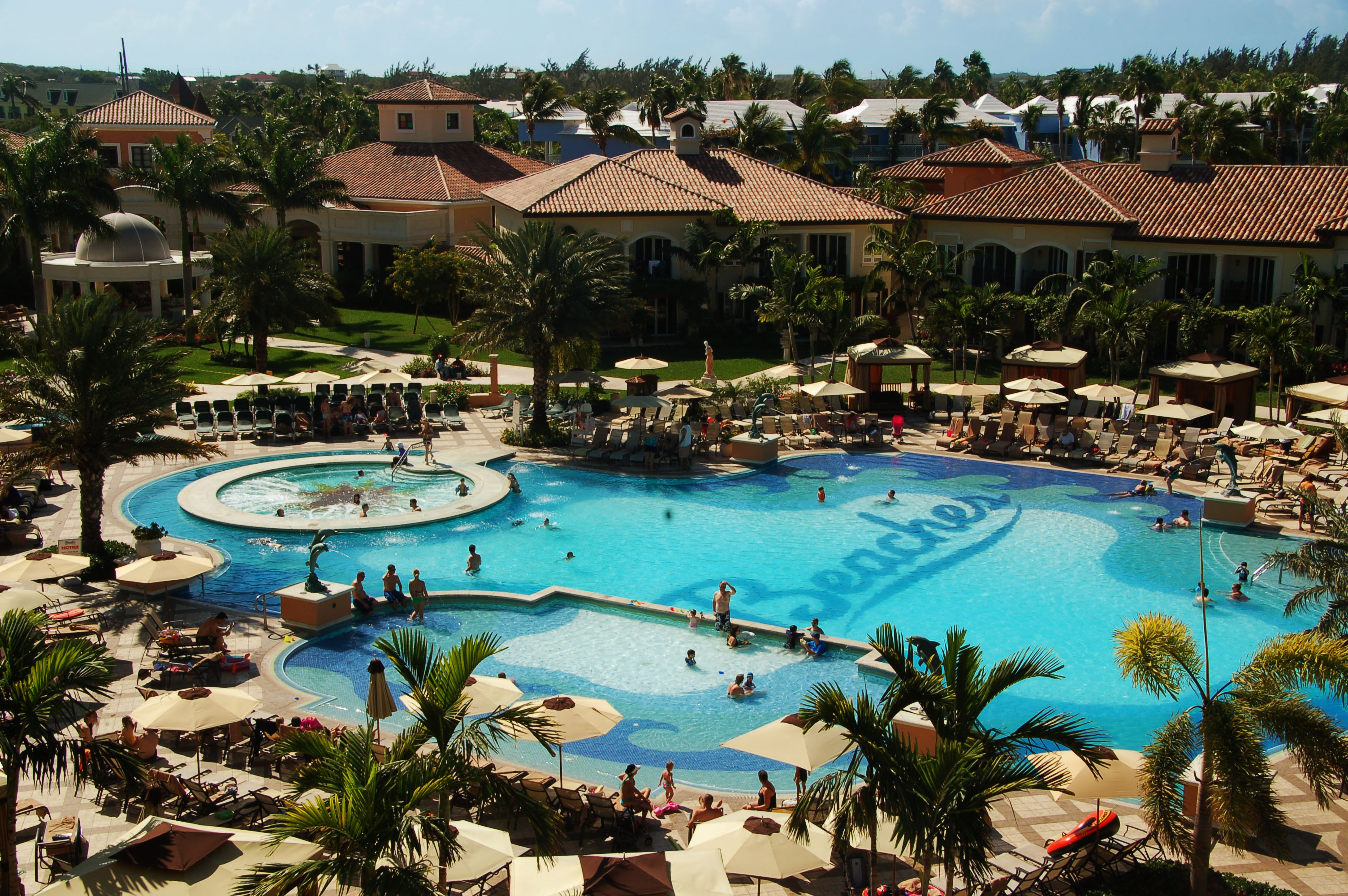 Beaches_0025